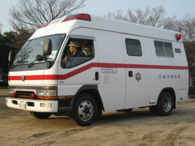 広島市消防局出初式にて